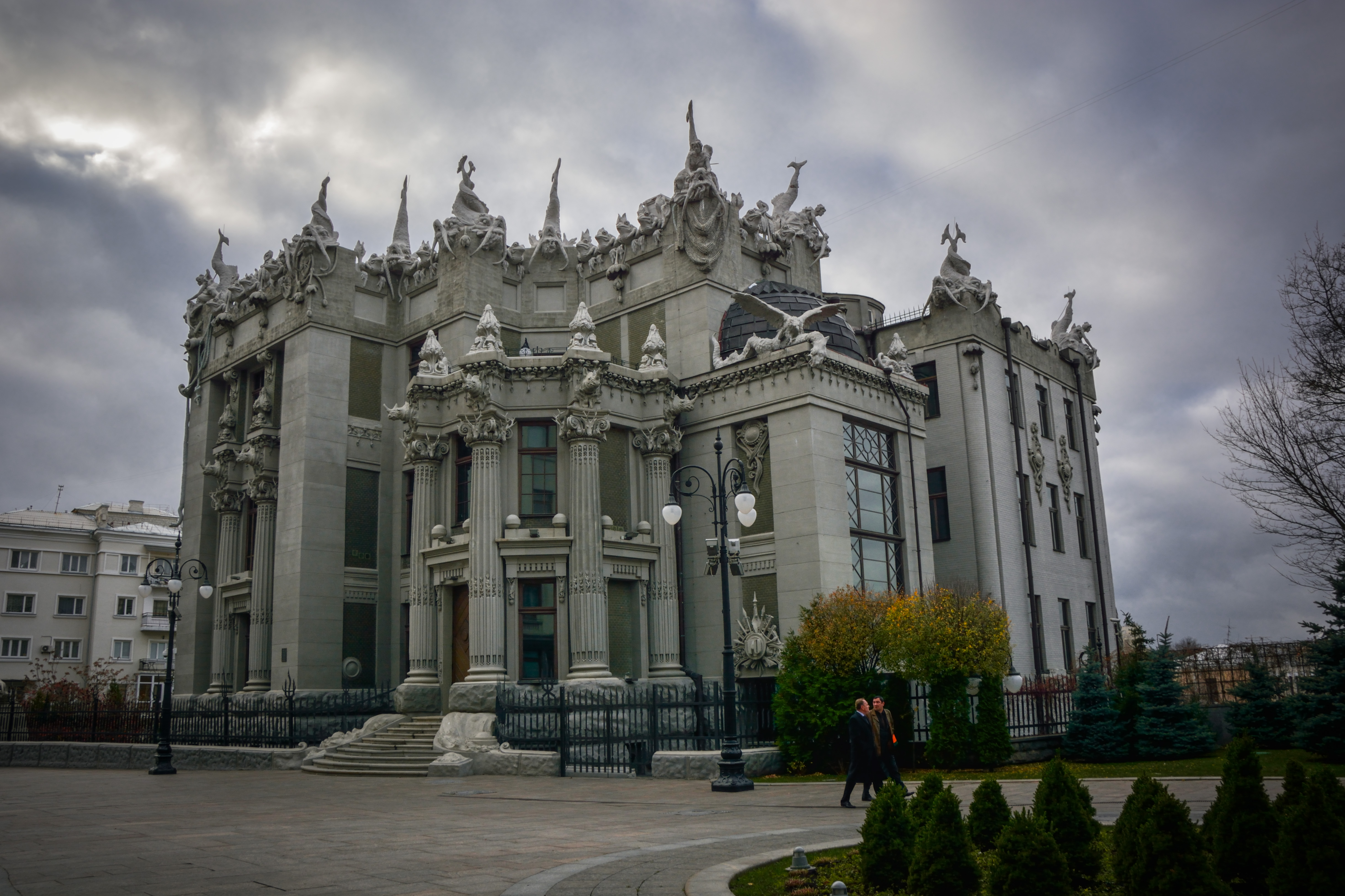 Будинок прибутковий, в якому жив В. В. Городецький, архітектор, Київ, Банкова вул., 10